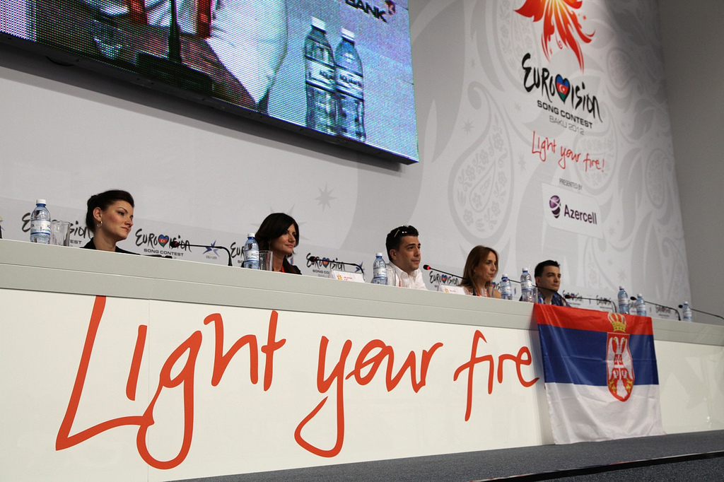 Serbian delegation